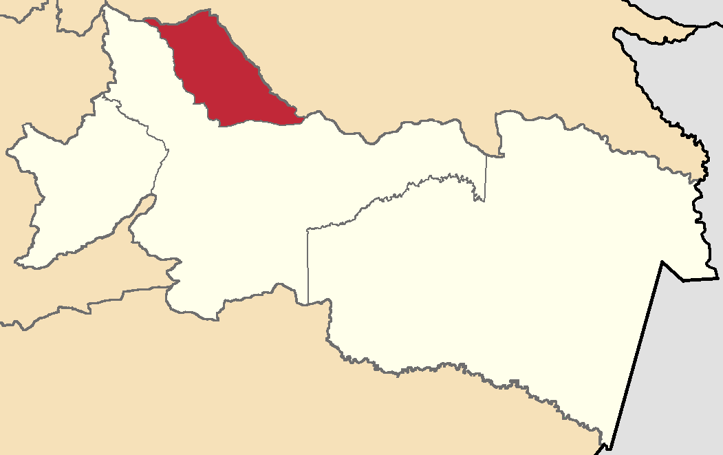 Mapa localizador del cantón en Orellana, Ecuador